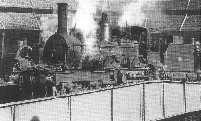 Locomotora Hartmann 220-2005 "Oest 9"